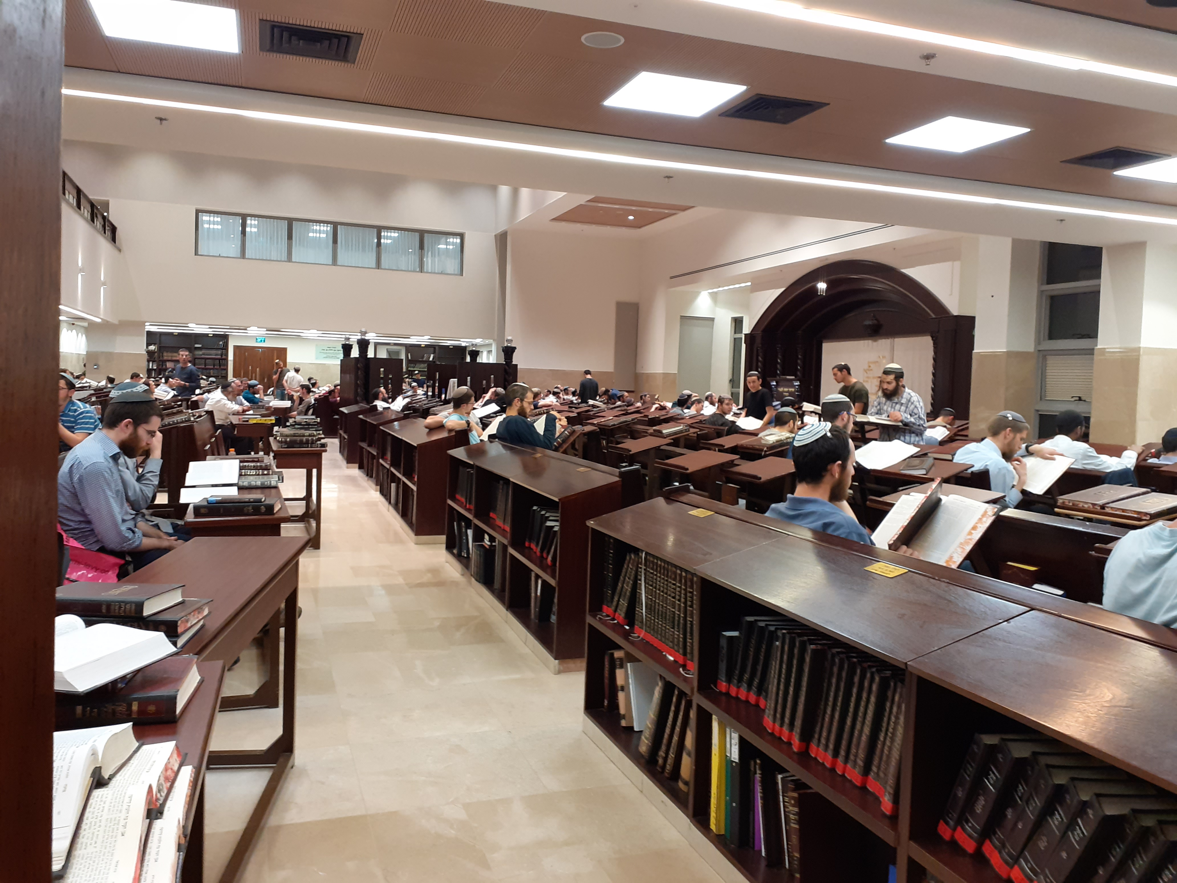 הר המור בהר חומה